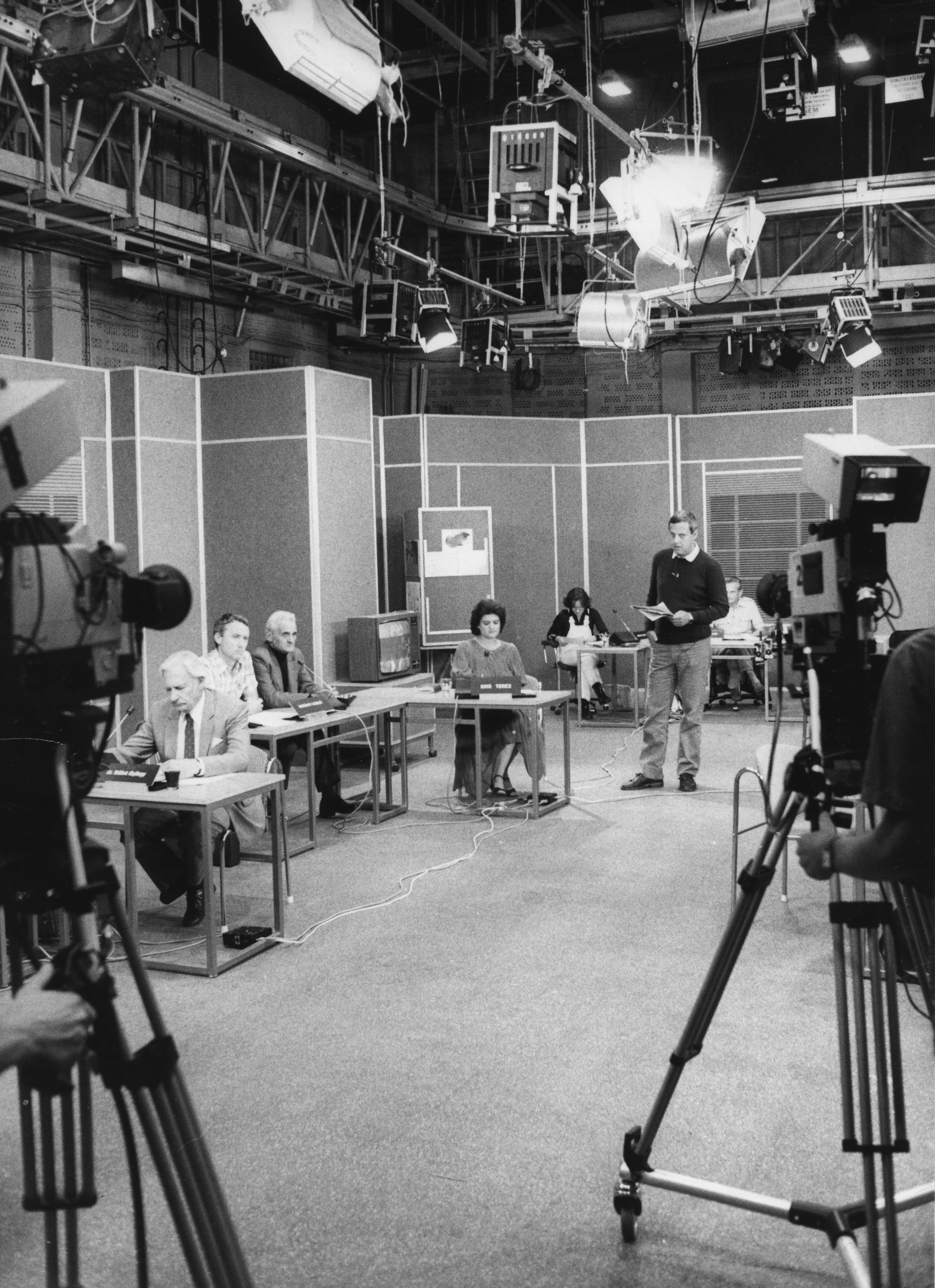 Az MTV Ablak című műsorának stúdiója. A műsorvezető Wisinger István, az asztaloknál elöl Bálint György, mögötte ingben Murányi László riporter, a műsorvezető mögött Petress István riporter